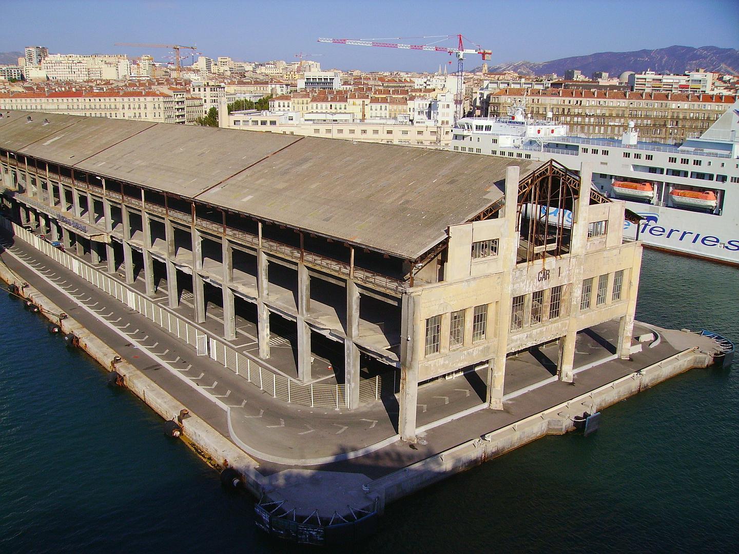 Le hangar J1 du port de Marseille-Joliette avant sa réhabilitation, vu depuis le ferry Napoléon Bonaparte le 1 août 2009.